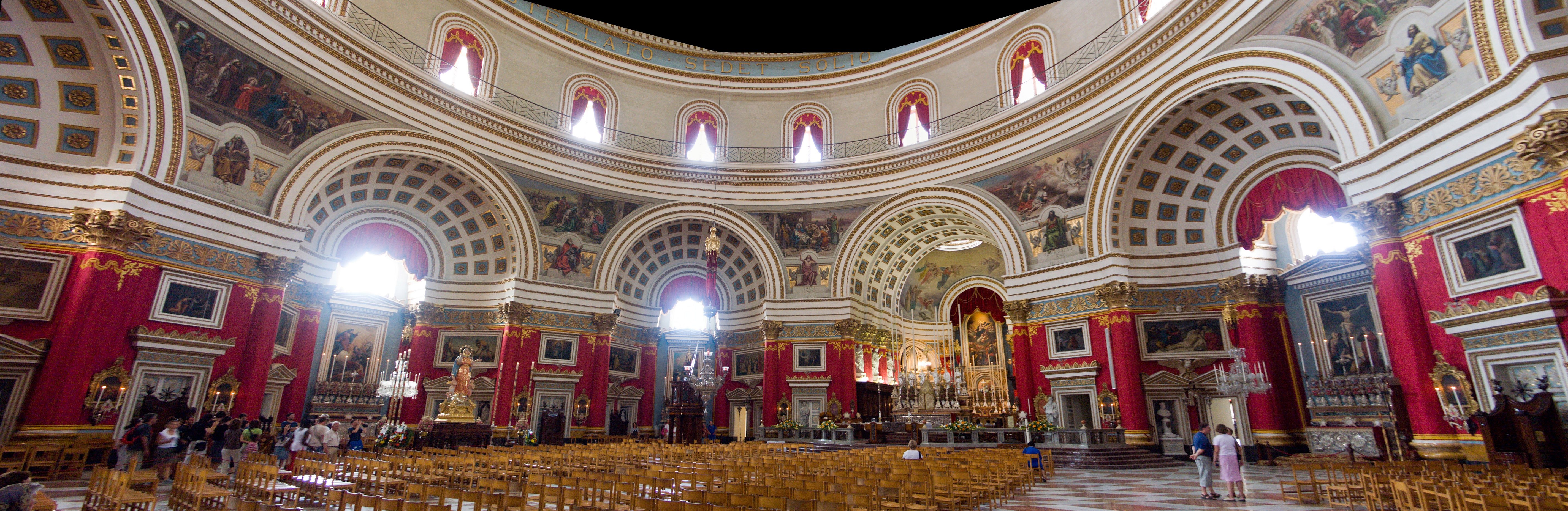 Panorama de l'intérieur du Dôme de Mosta à Malte